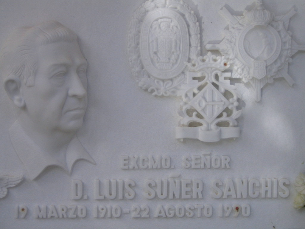 Sepultura de Luís Suñer en el panteón de la familia Suñer-Picó. Cementerio de Alzira (España).